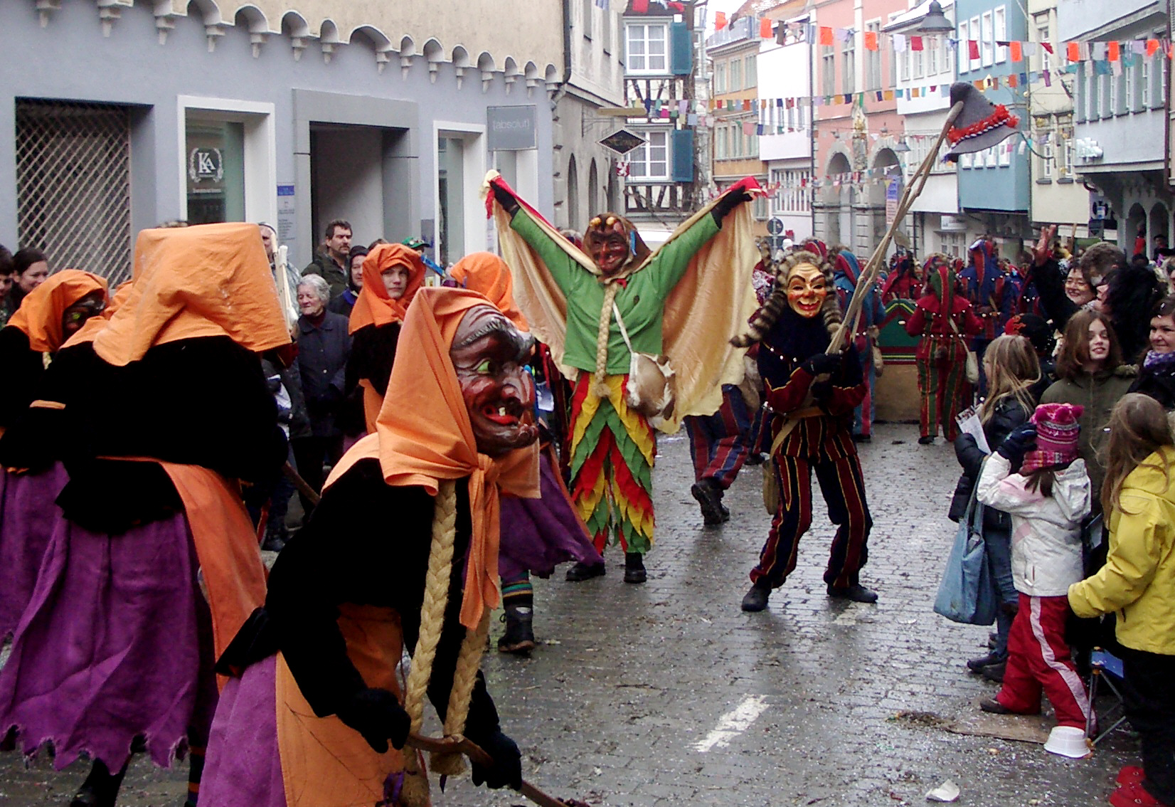 Narrensprung in Ravensburg am Fasnetsmontag 2010 Ravensburger Schwarze Veri Zunft e. V. in der Marktstraße Narrenfiguren: links: Hexenliesel vom Pfannenstiel Mitte: Hexenteufel (Einzelfigur) rechts und im Hintergrund: Ölschwang-Papierkrattler